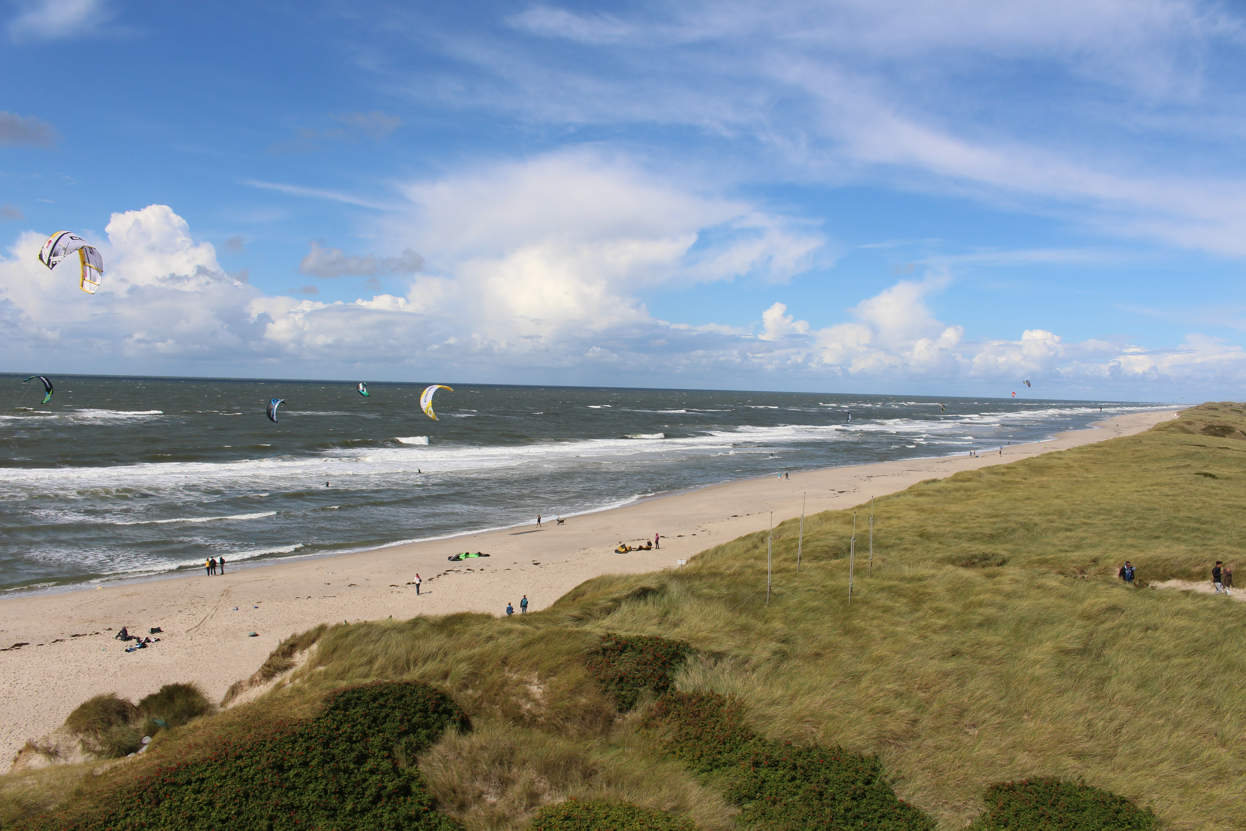 typischer Küstenabschnitt mit Dünenlandschaft auf Sylt